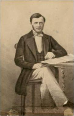 Reproduktion einer frühen Photographie von Friedrich Gruber um 1850